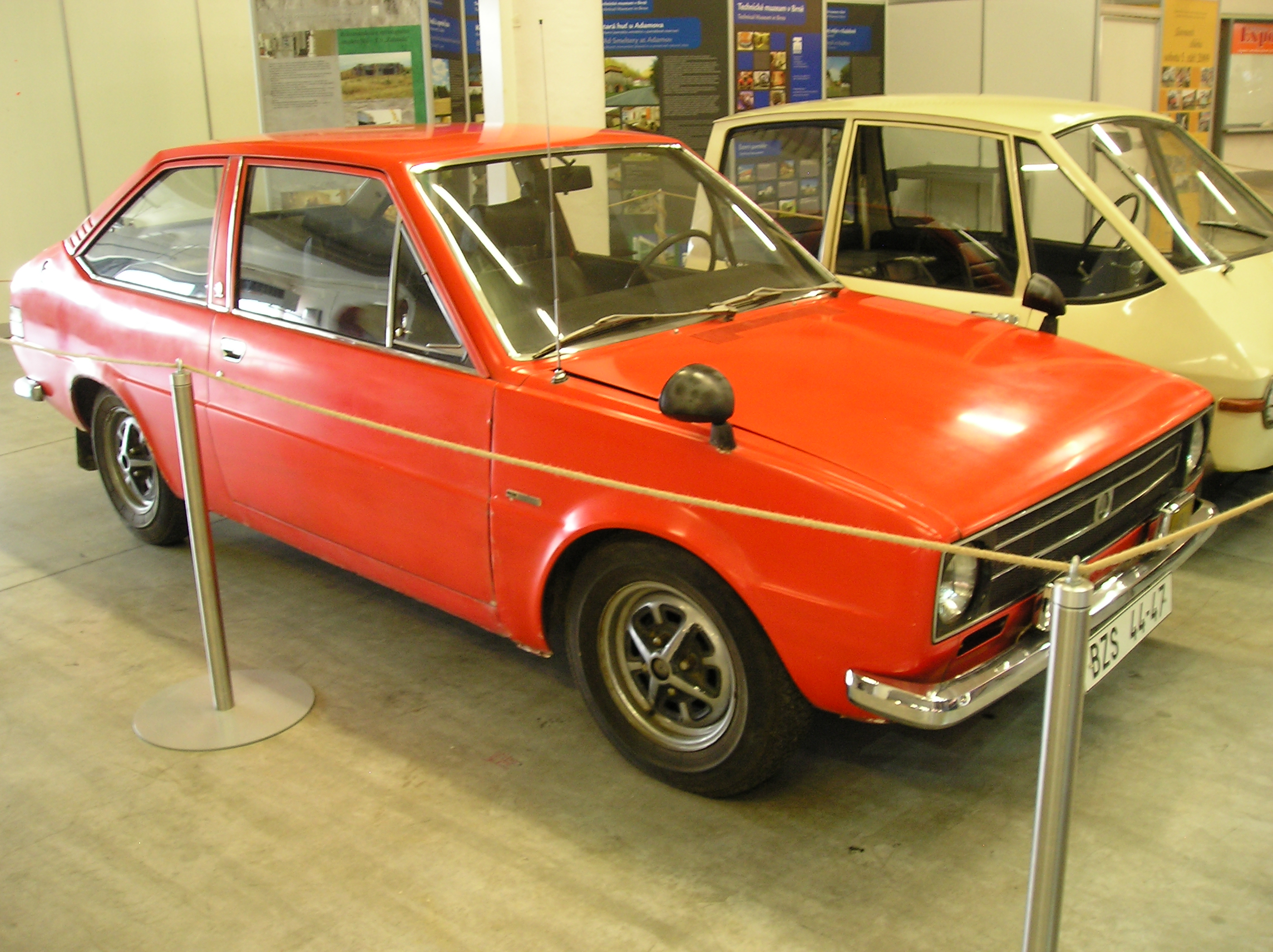 Škoda 720 coupé na autosalonu Brno 2009